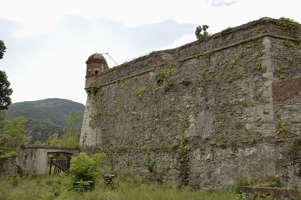 Fort les Bains, Amélie-les-Bains-Palalda (Pyrénées-Orientales, Languedoc-Roussillon, France)